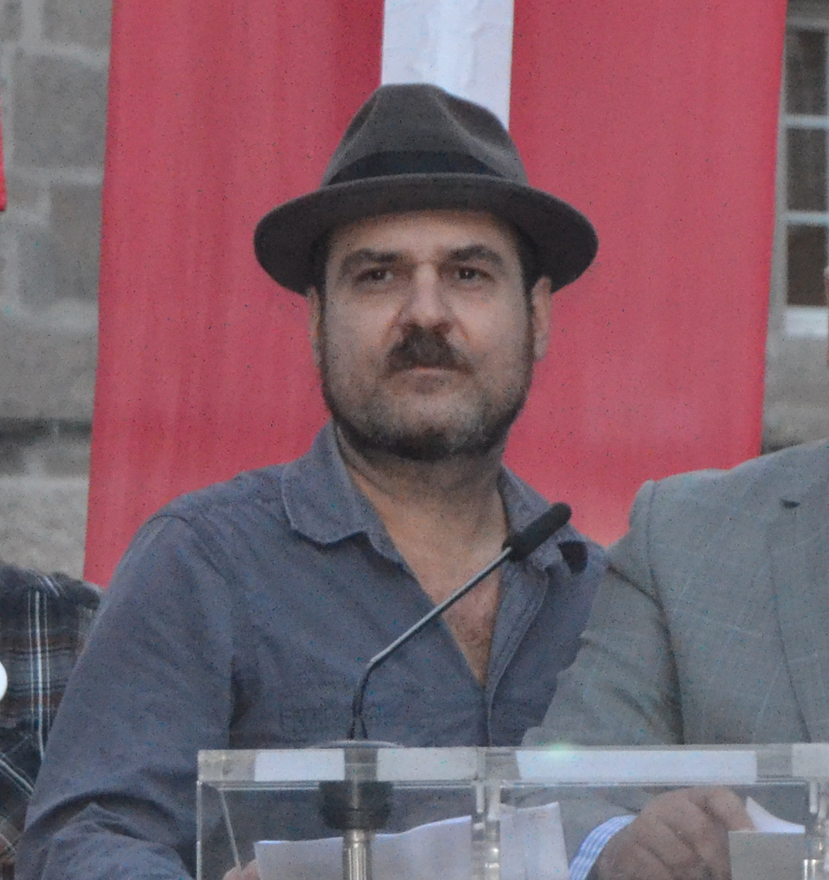 Eladio Santos na manifestación contra a privatización do novo hospital de Vigo, o Álvaro Cunqueiro.